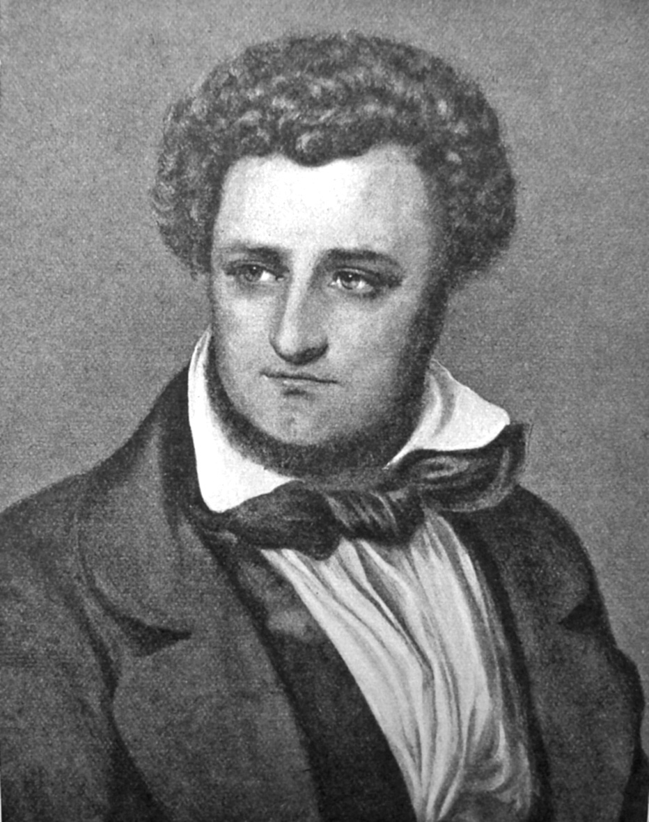 Peter Martin Orla Lehmann (15. maj 1810 - 13. september 1870) var en dansk jurist og politiker. Han var en af de ledende personer i den liberale opposition mod enevælden, og med til at redigere D.G. Monrads grundlovsudkast.